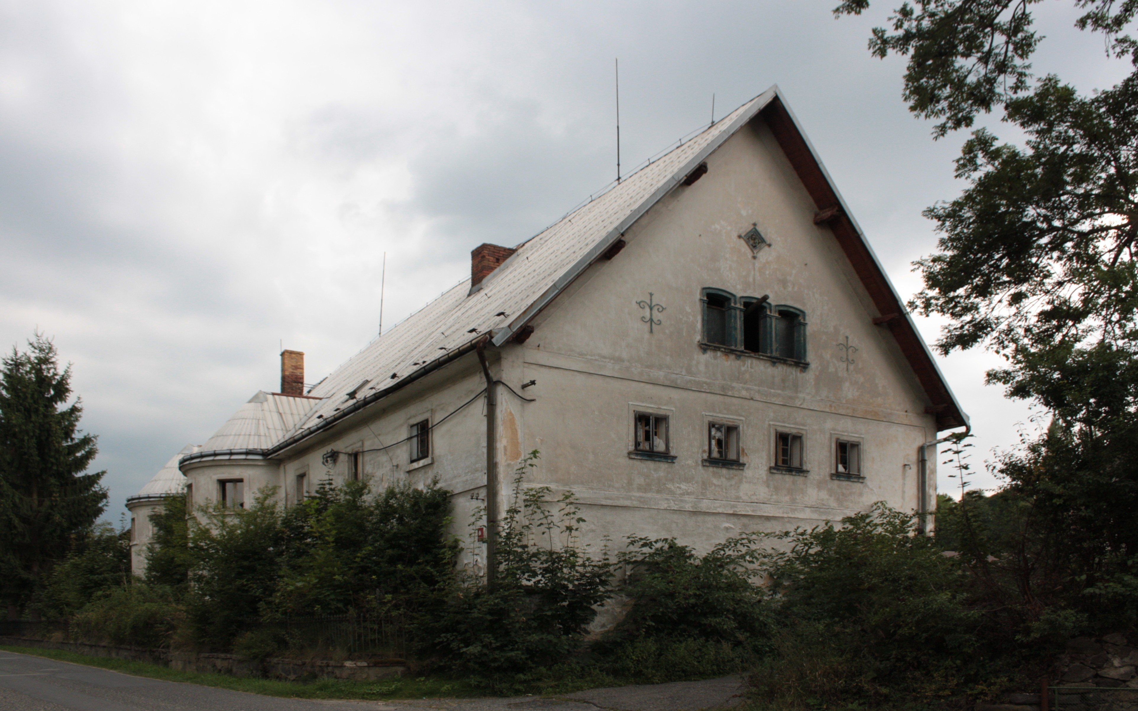 This photograph was taken with a DSLR from WMCZ's Camera grant. Dům číslo popisné 1 v Kunraticích poblíž Frýdlantu v okrese Liberec.